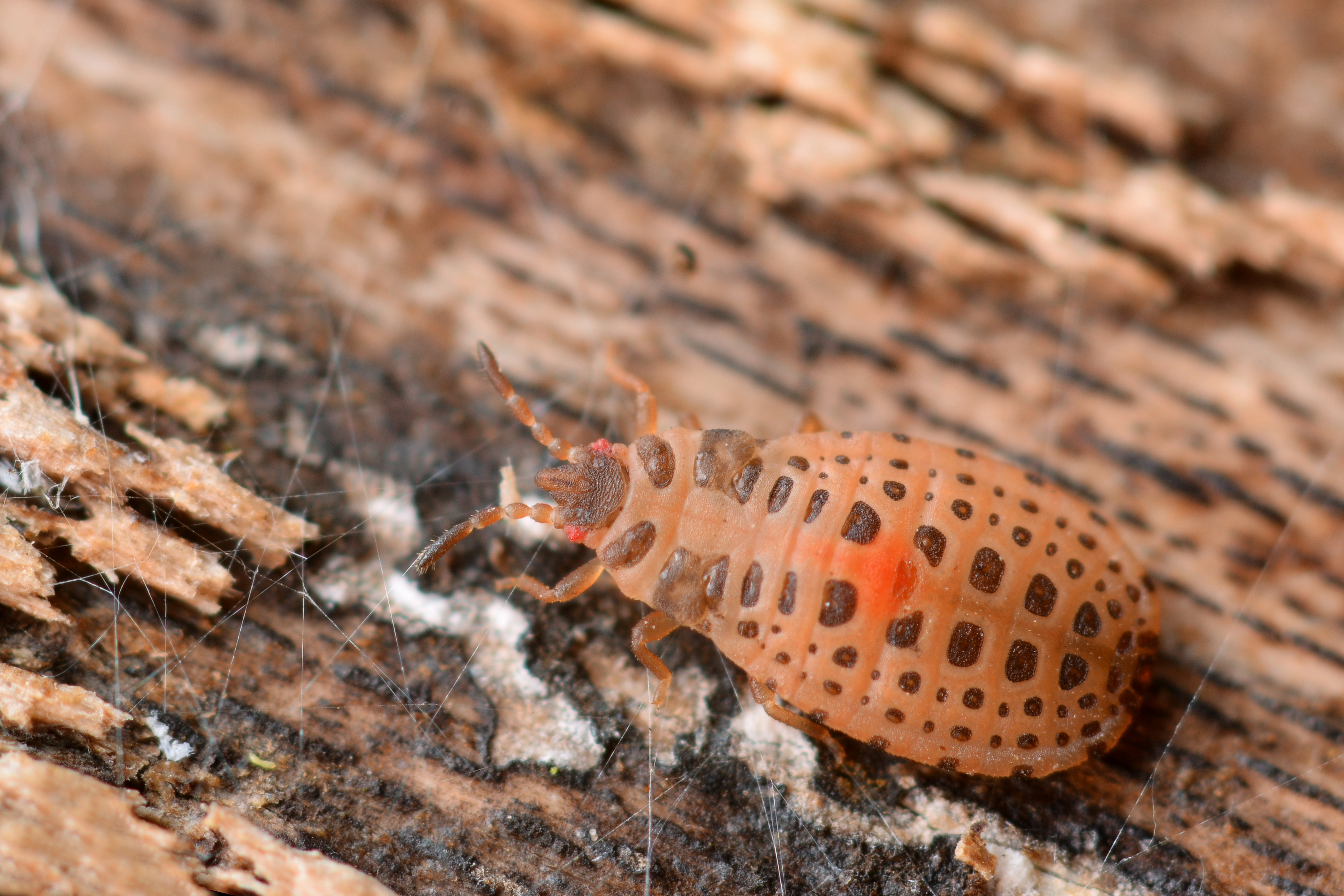 Flat bug (Aneurus avenius) larva (Hemiptera Aradidae)